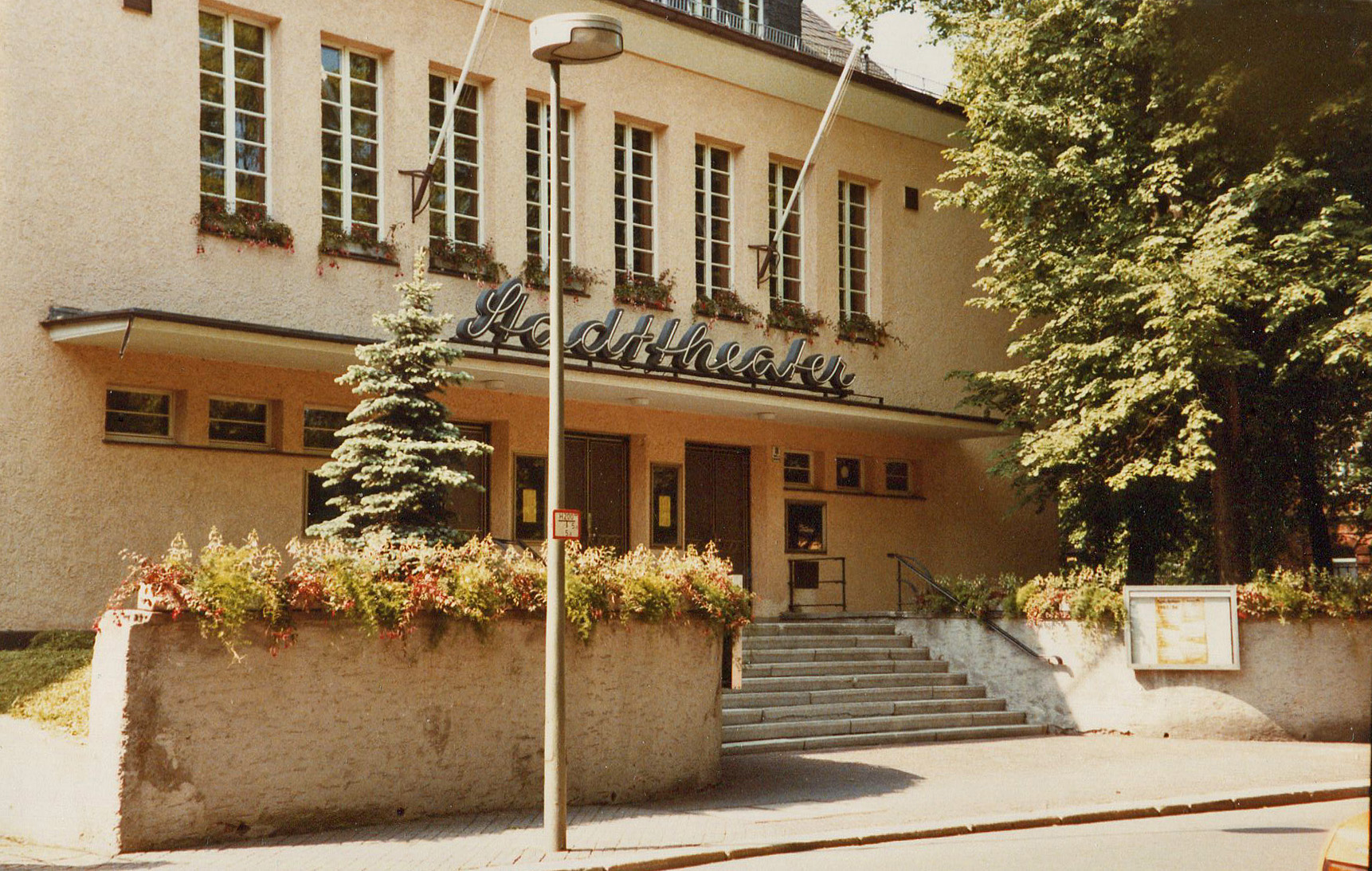 früheres Theater in Hof, Schützenstraße, um 1985